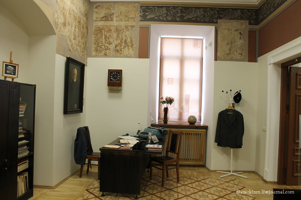 Кабінет. Мастацкая галерэя Міхаіла Савіцкага